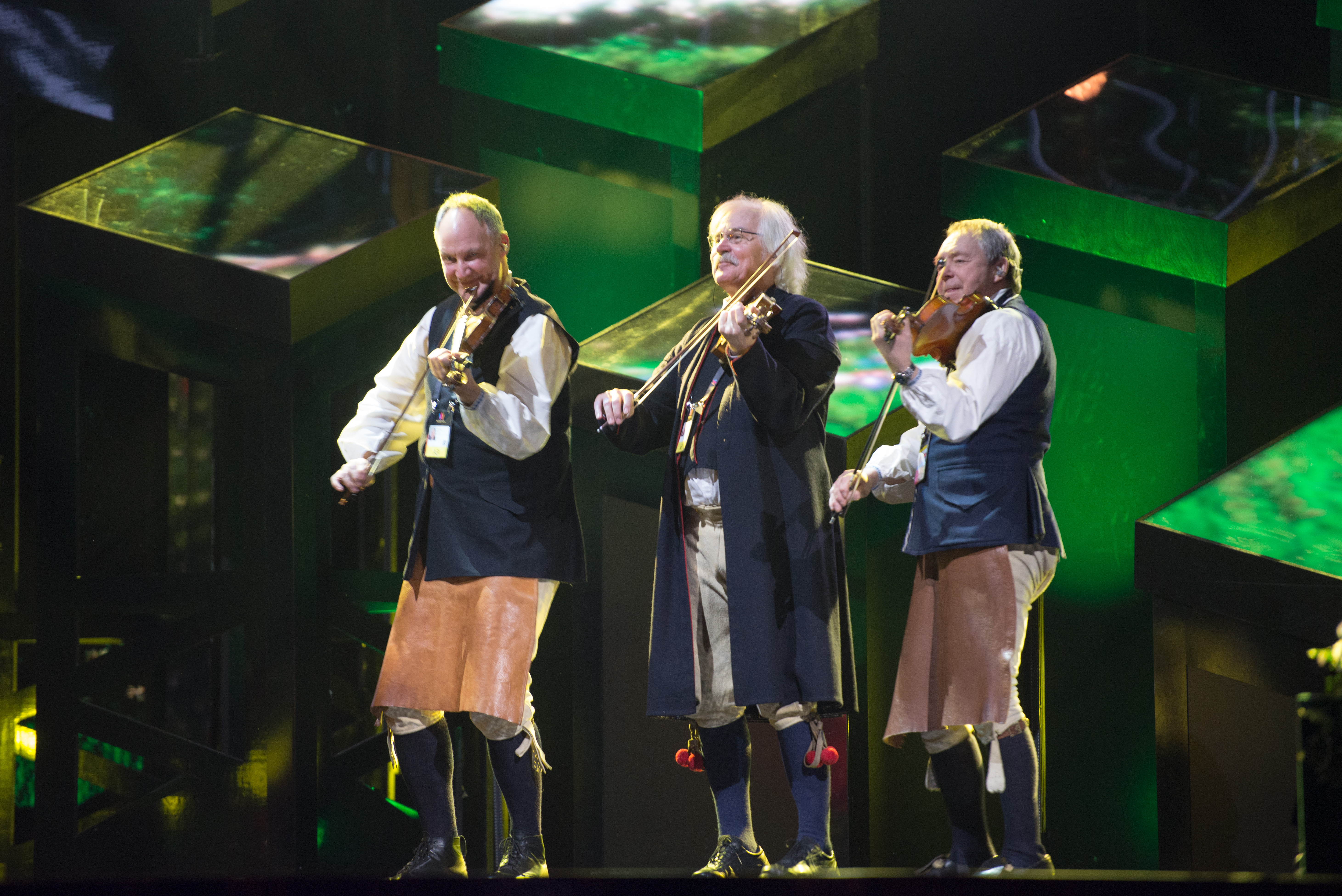 Kalle Moreus(ej med i bild) under genrepet inför Melodifestivalen 2018 i Malmö.